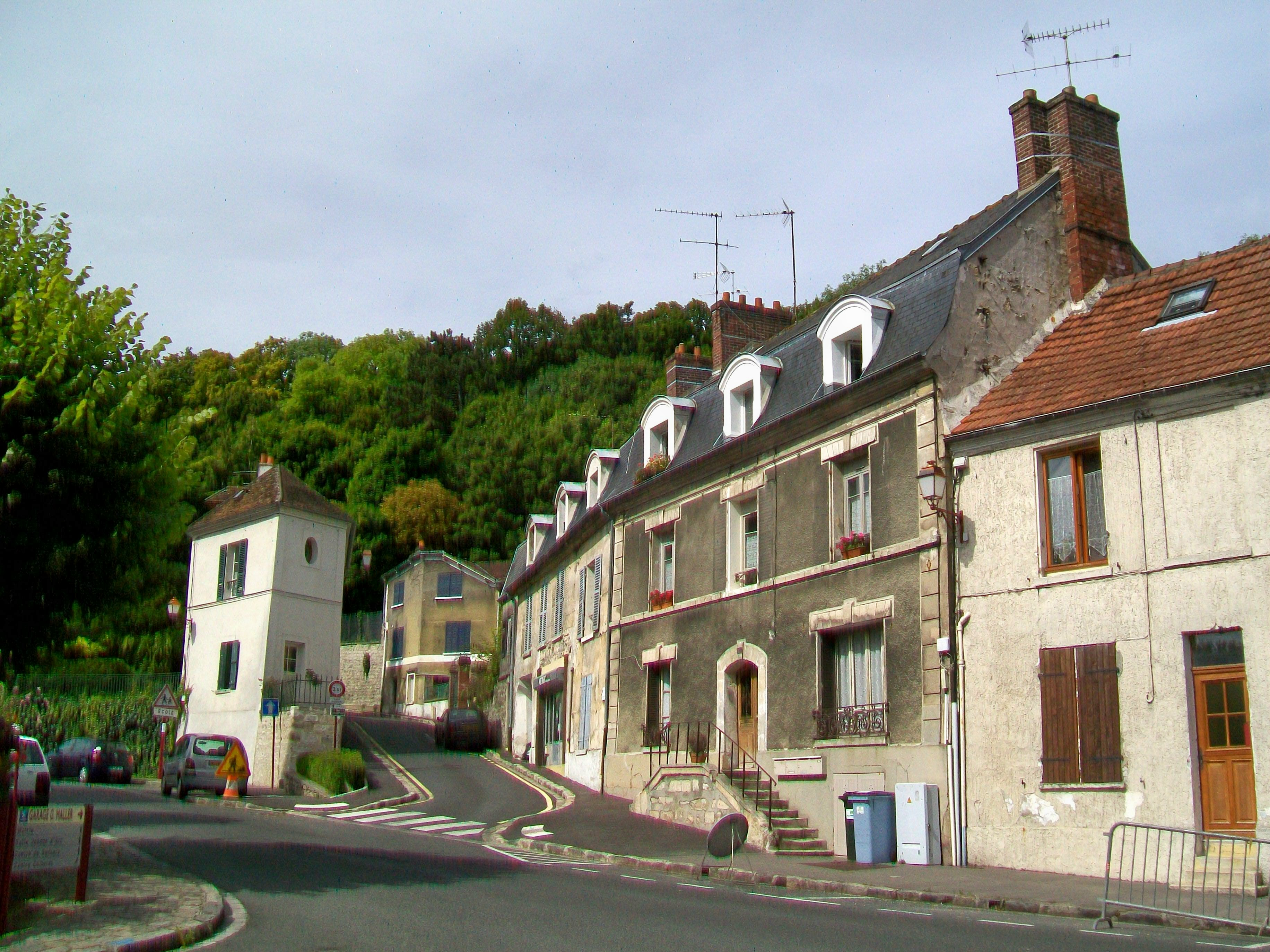 La rue Adalbert-Baut, qui monte de l'église vers le cimetière.